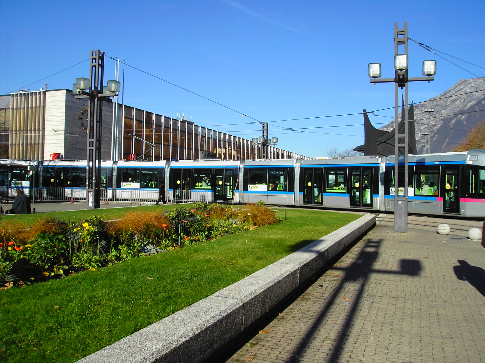 tramaway citadis devant la gare de Grenoble